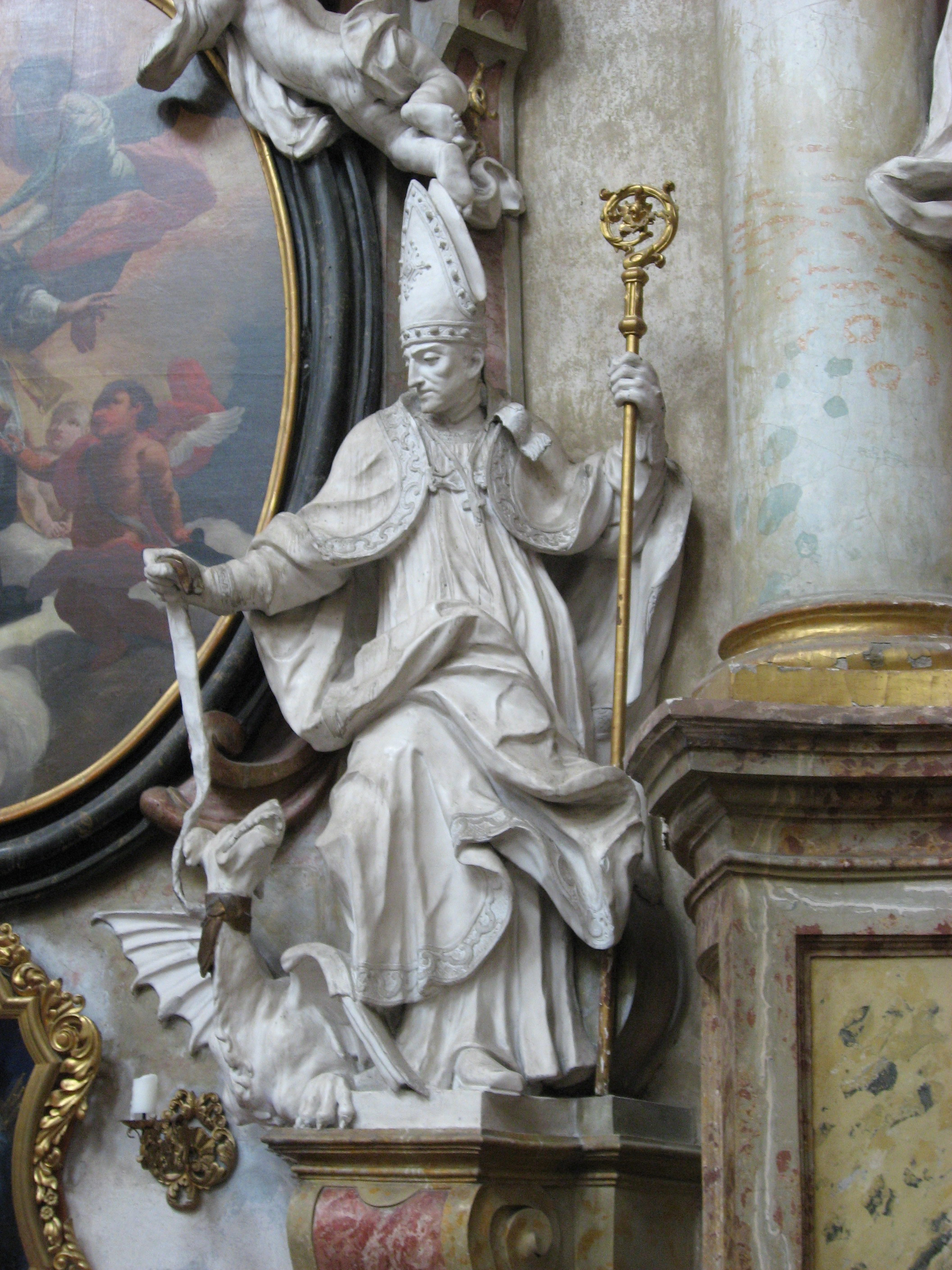 Socha v Rajhradském klášteře